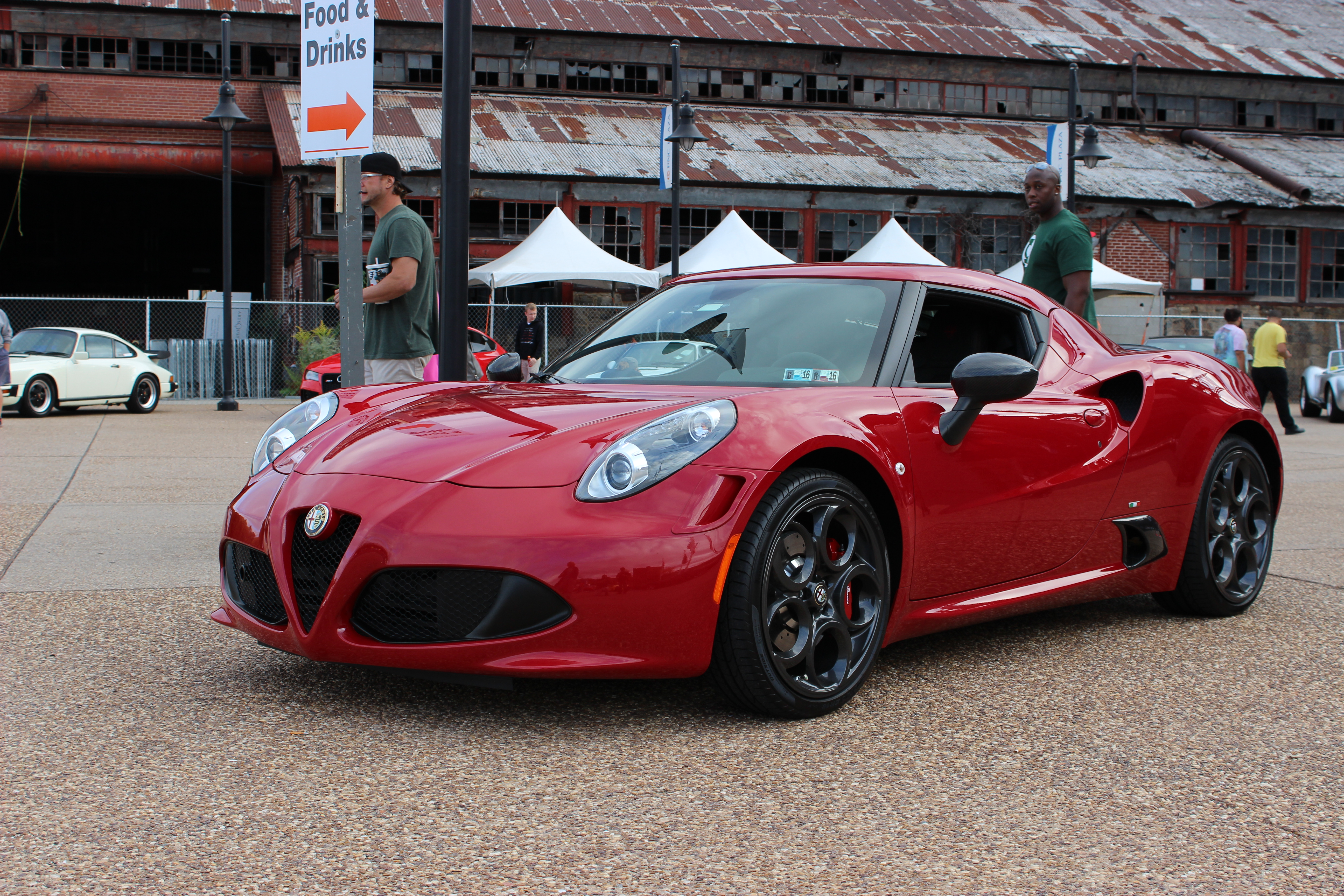 Alfa Romeo 4C